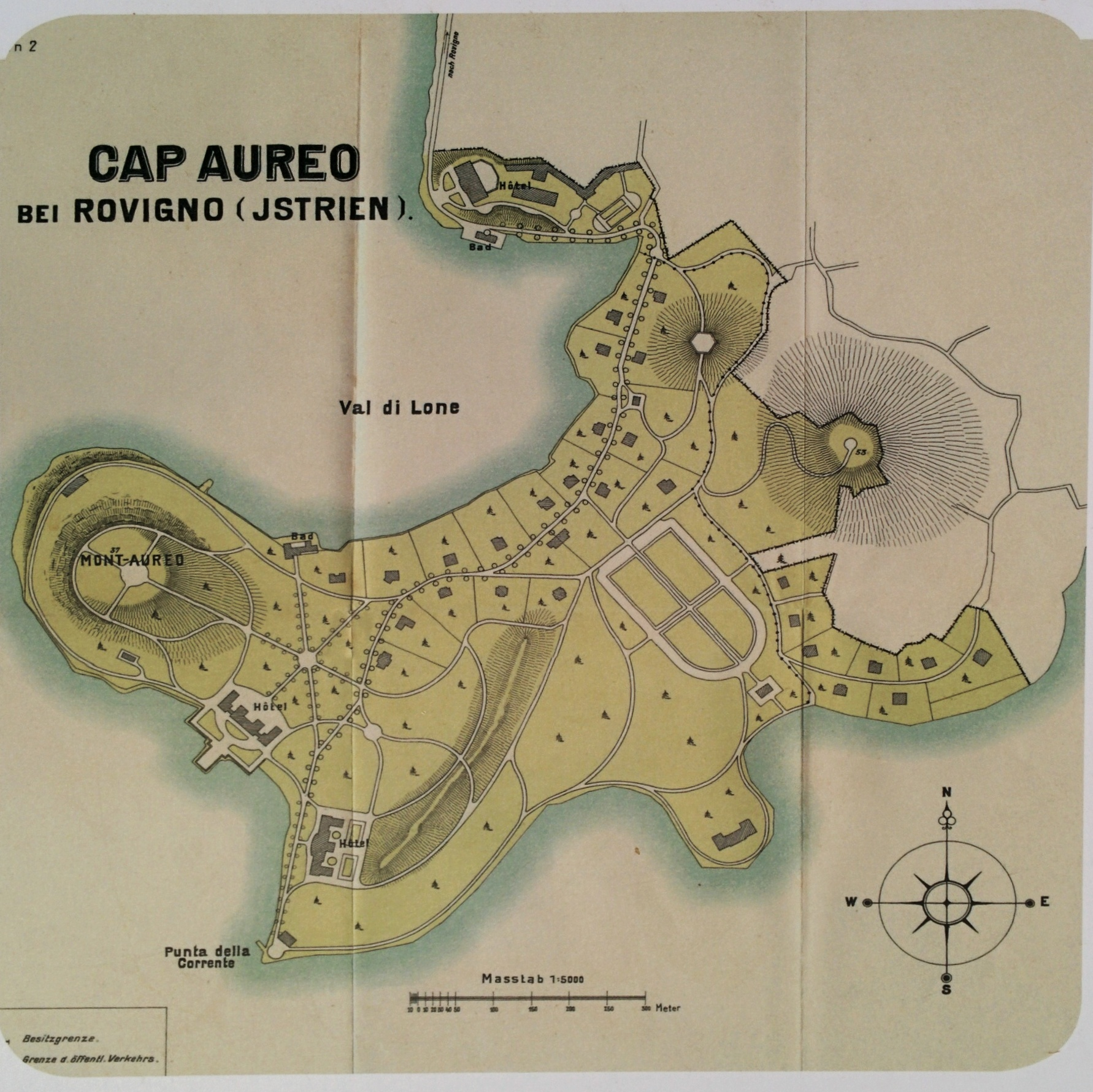 Bild abfotografiert von einer Infotafel im Park Zlatni Rt (Goldenes Kap) in Istrien